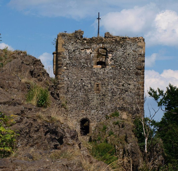 Obytná věž hradu Ralsko